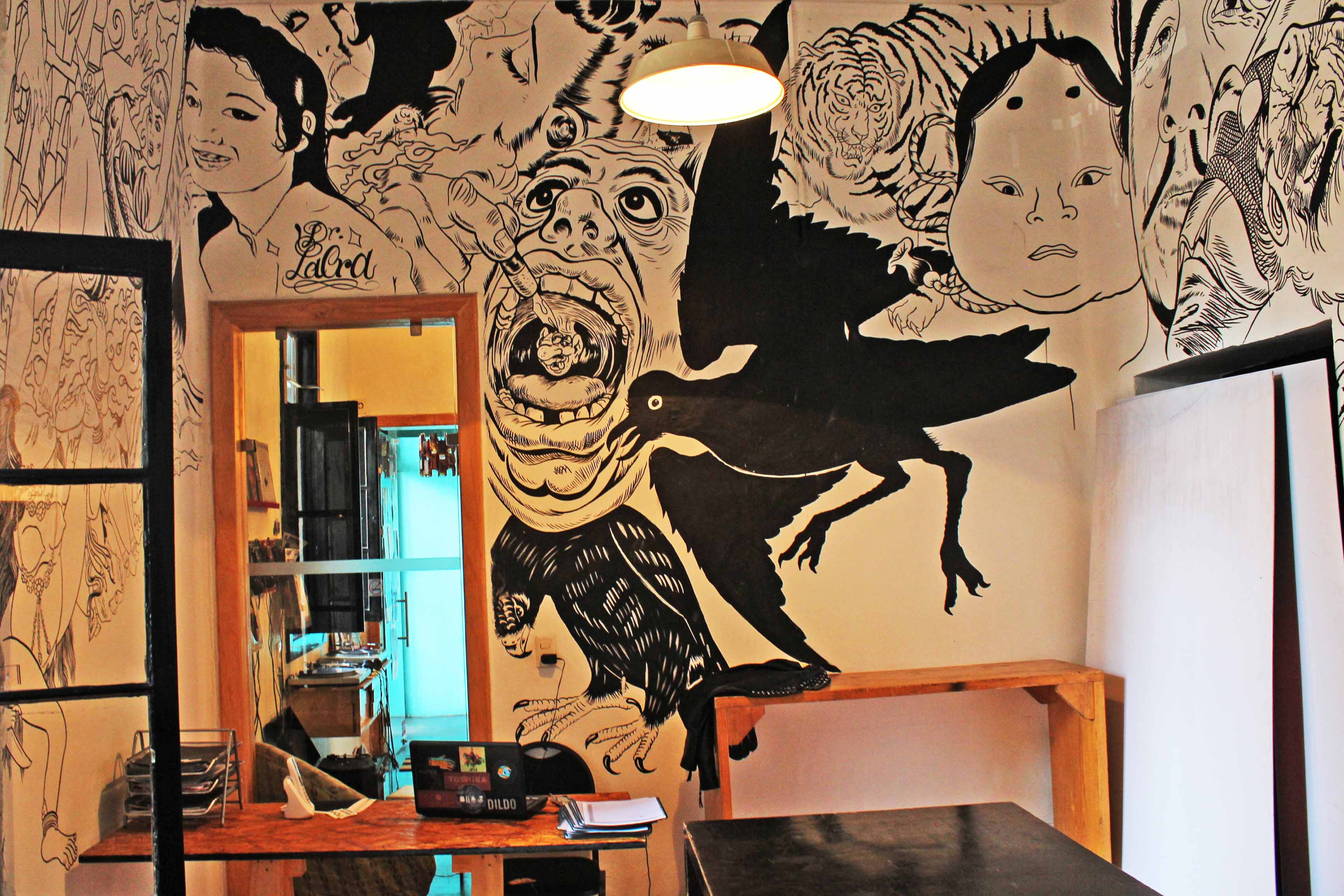 Foto del interior de Centro Cultural Border